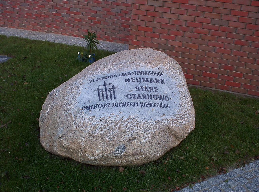 Glinna - cmentarz żołnierzy niemieckich.